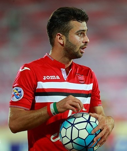 سروش رفیعی با پرسپولیس در لیگ قهرمانان آسیا